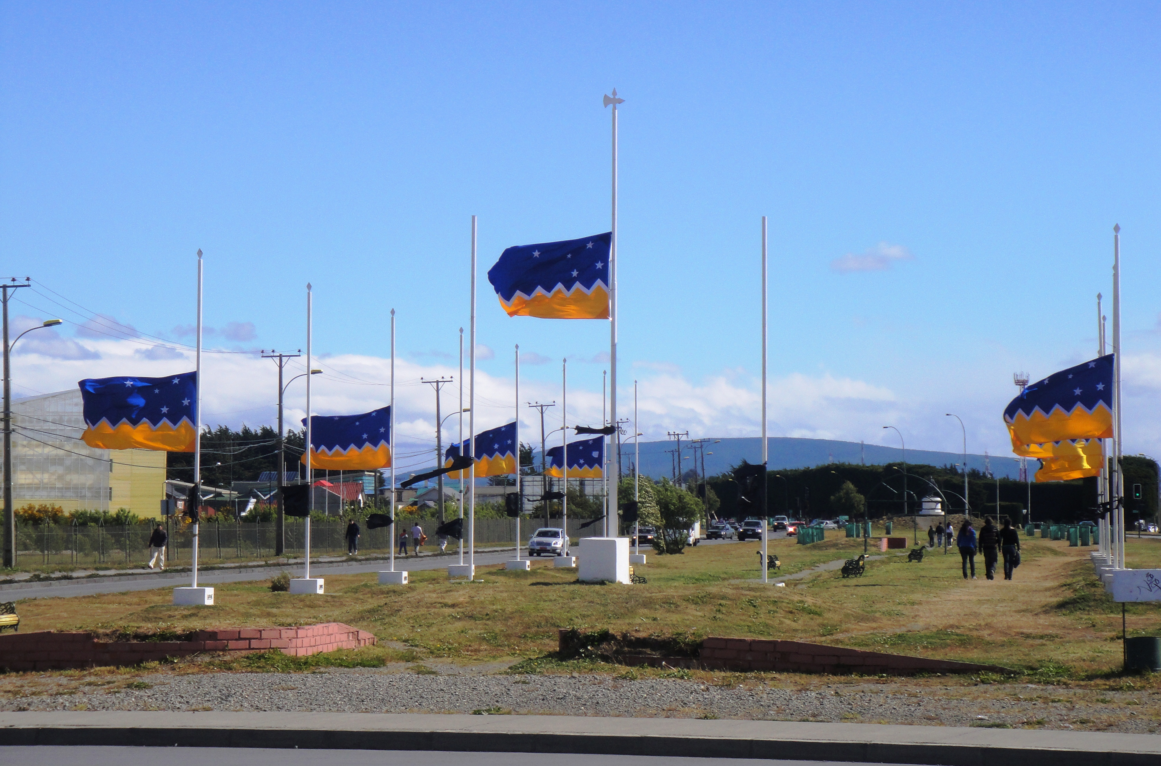 Plaza de las banderas de Avenida Bulnes